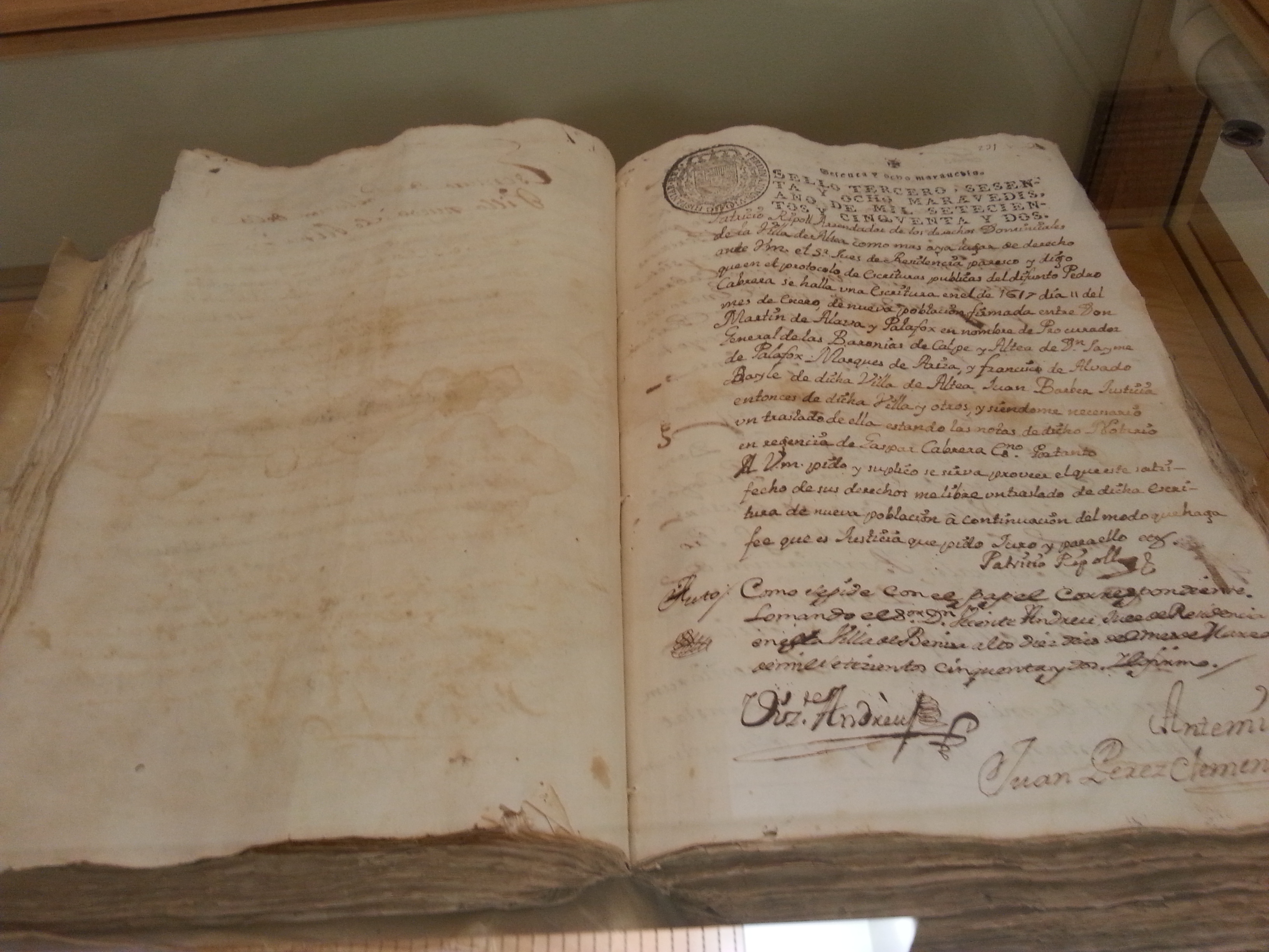 En Martí d'Àlava i Palafox, procurador d'en Jaume Palafox, senyor de les baronies de Calp i Altea i marqués d'Ariza, d'una part, i Francesc Alvado, batle d'Altea, Joan Barber i altres pobladors, d'altra part, convenen carta de nova població per al lloc d'Altea (11 de gener de 1617). Arxiu del Regne de València. ARV: Escrivanies de Cambra, 1773, expedient 36, fol. 21-29 i 231-240 (còpia de 10 de març de 1752).